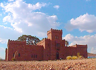 Schloss Duwisib, Namibia 1998